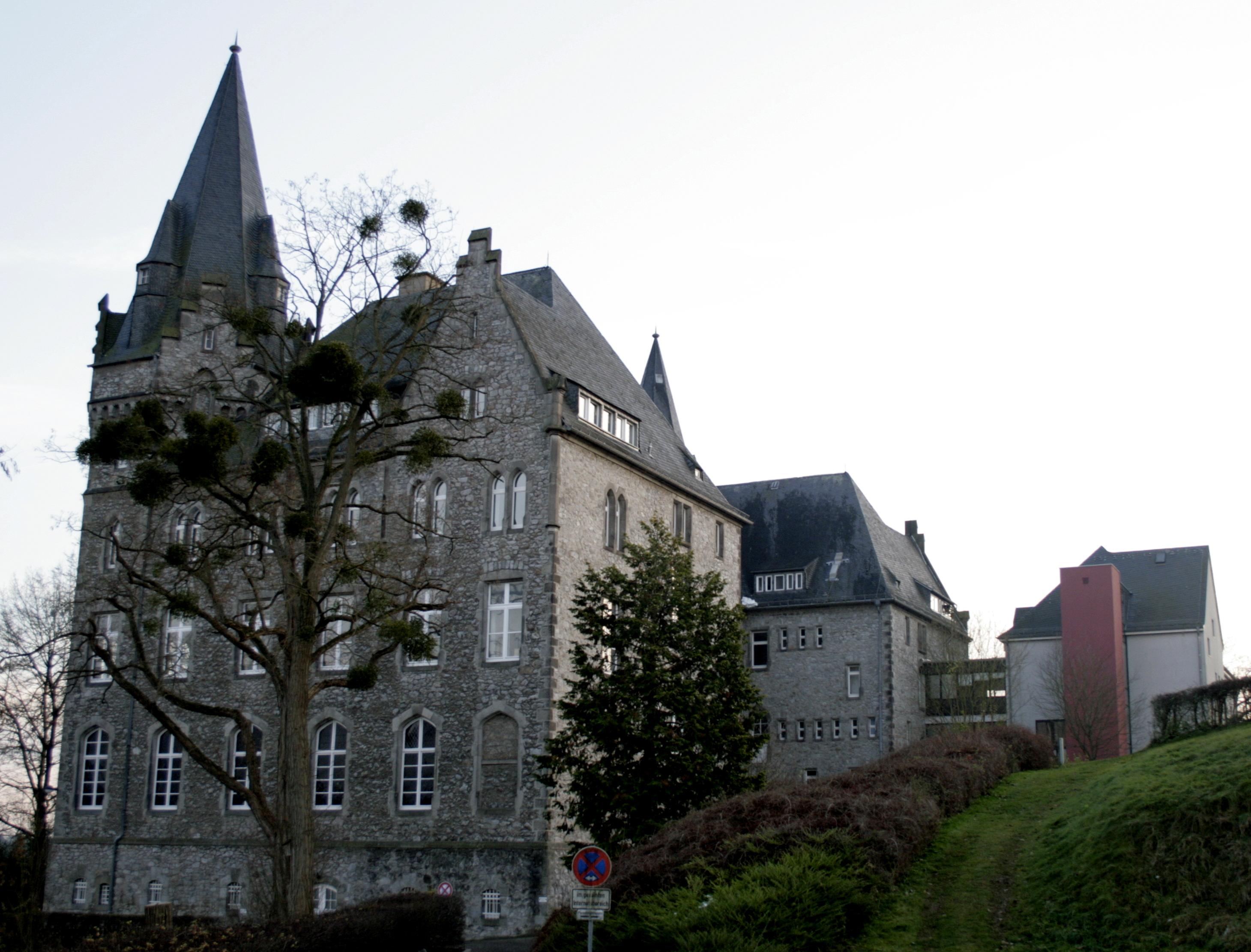 Musisches in Hadamar, Deutschland, Seitenansicht des Gebäudes mit Neubau